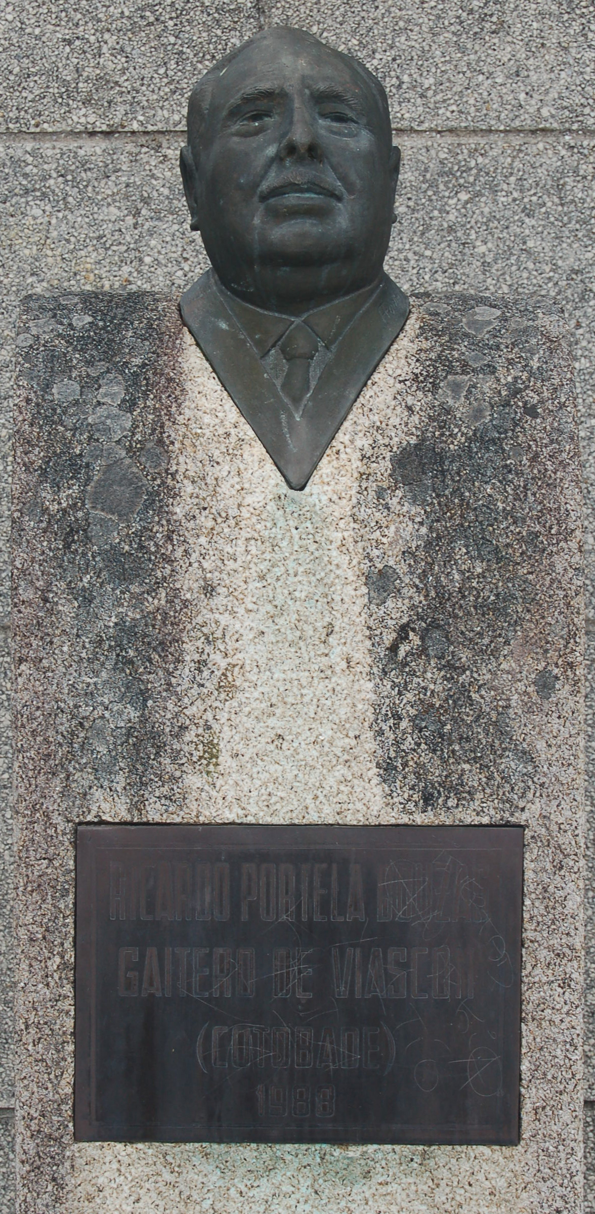 Busto de Ricardo Portela na Chan, xunto á casa consistorial do Concello de Cotobade